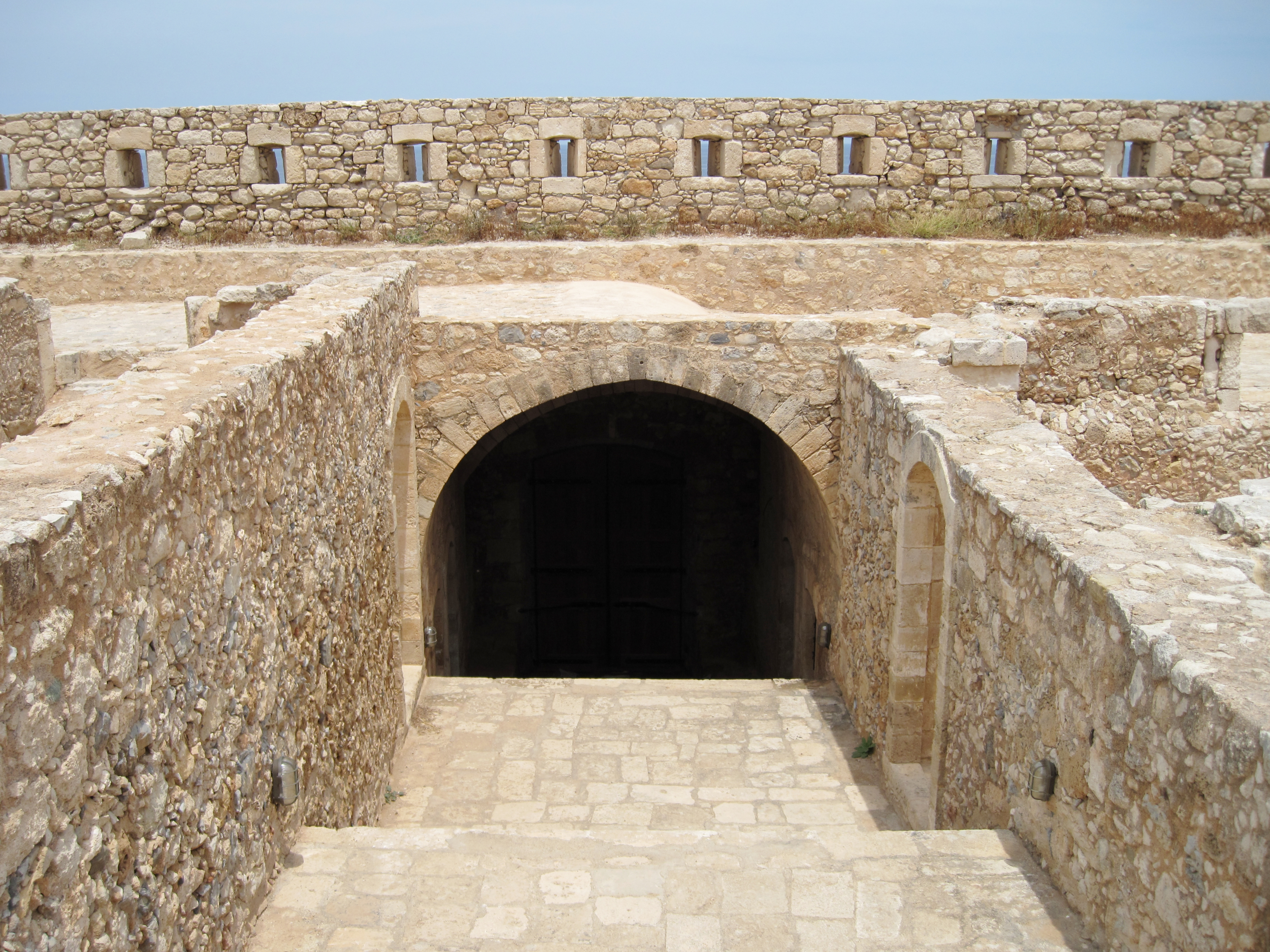 Zugang zu den Lagerräumen im nördlichen Bereich der Fortezza von Rethymno (Φορτέτζα του Ρεθύμνου), Festungsanlage innerhalb der Stadt Rethymno, Regionalbezirk Rethymno, Kreta, Griechenland